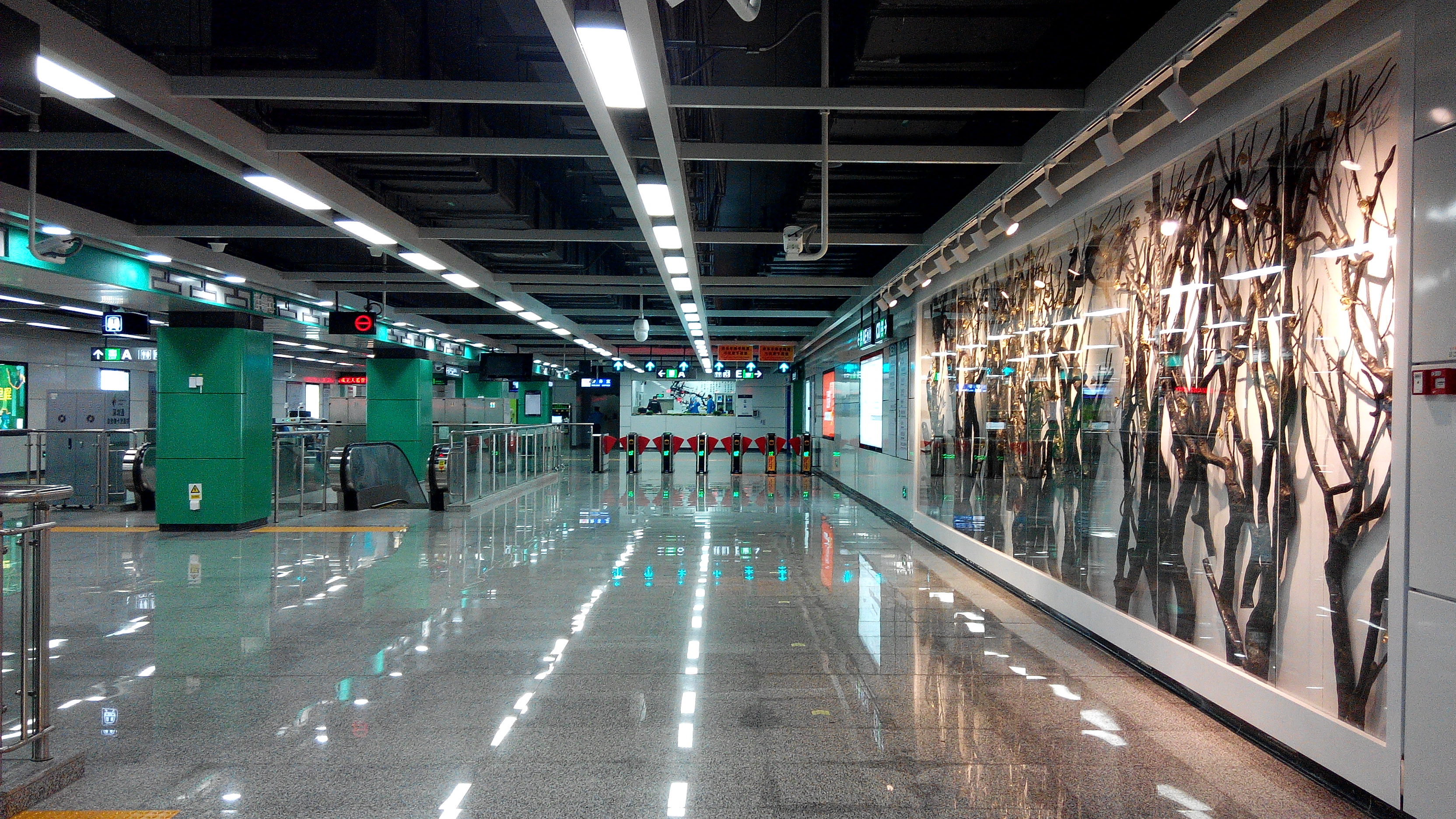 深圳地铁9号线 梅村站大堂